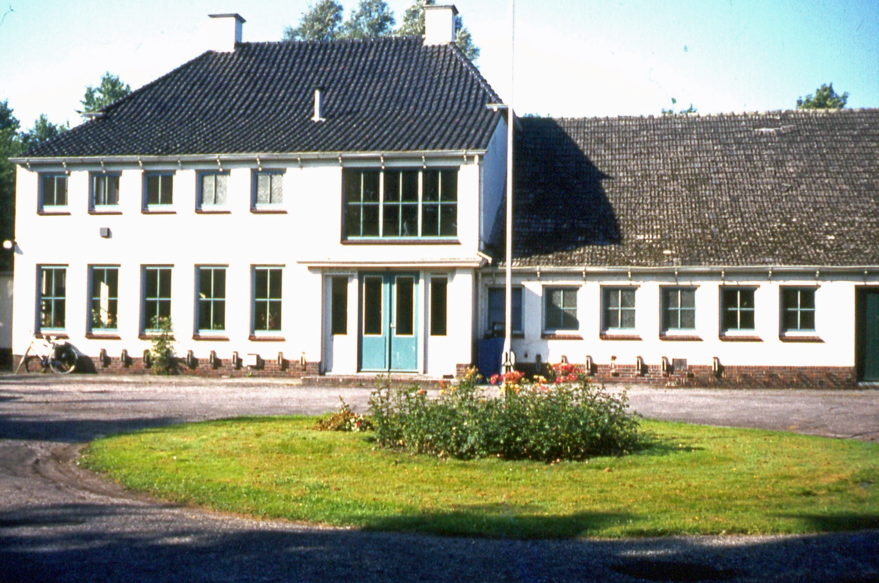 Voormalig gezondheidscentrum van Stadskanaal, afgebroken omstreeks 1975, scan van een door mij gemaakte dia in 1974